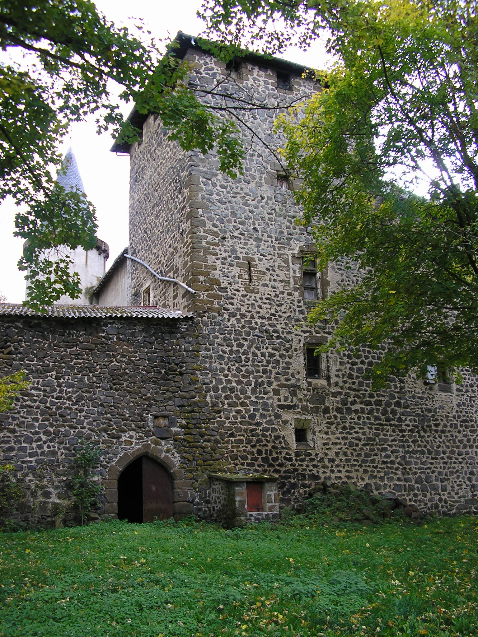 Château du Charrouil Photographie personnelle de l'utilisateur Clodion.